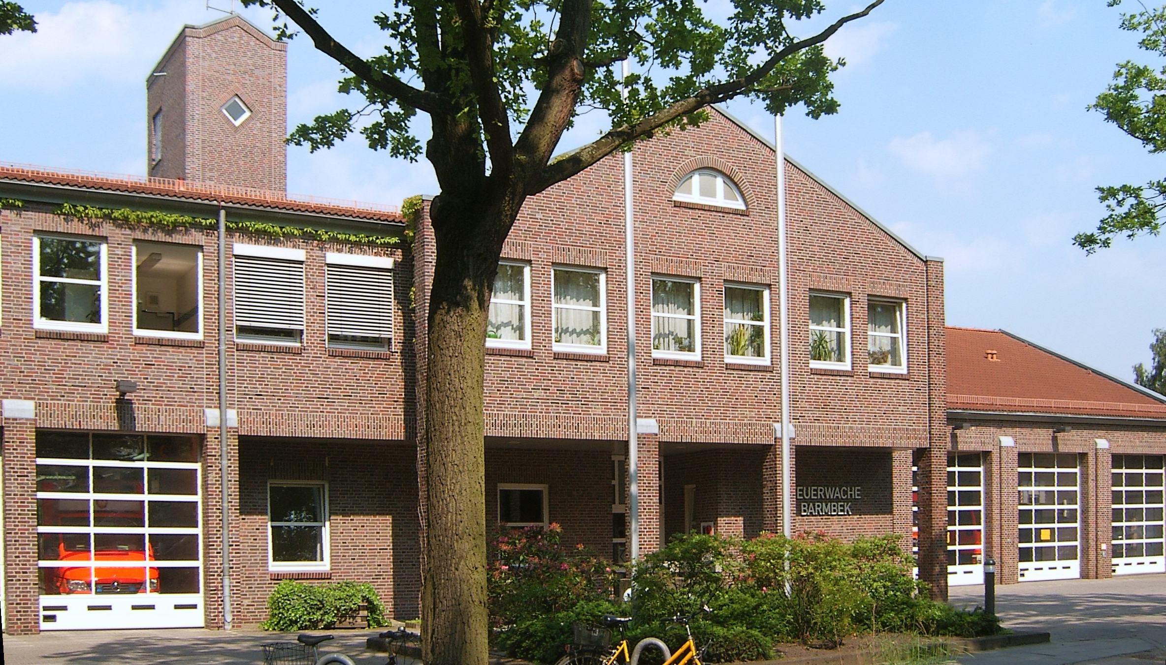 Hamburg, Barmbek, Feuerwache Maurienstraße